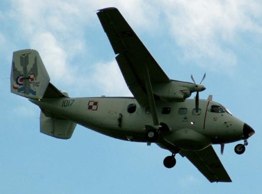 PZL M-28 Bryza-1R w barwach 304 dywizjonu "Ziemi Śląskiej" im. Ks. Józefa Poniatowskiego pl.wiki